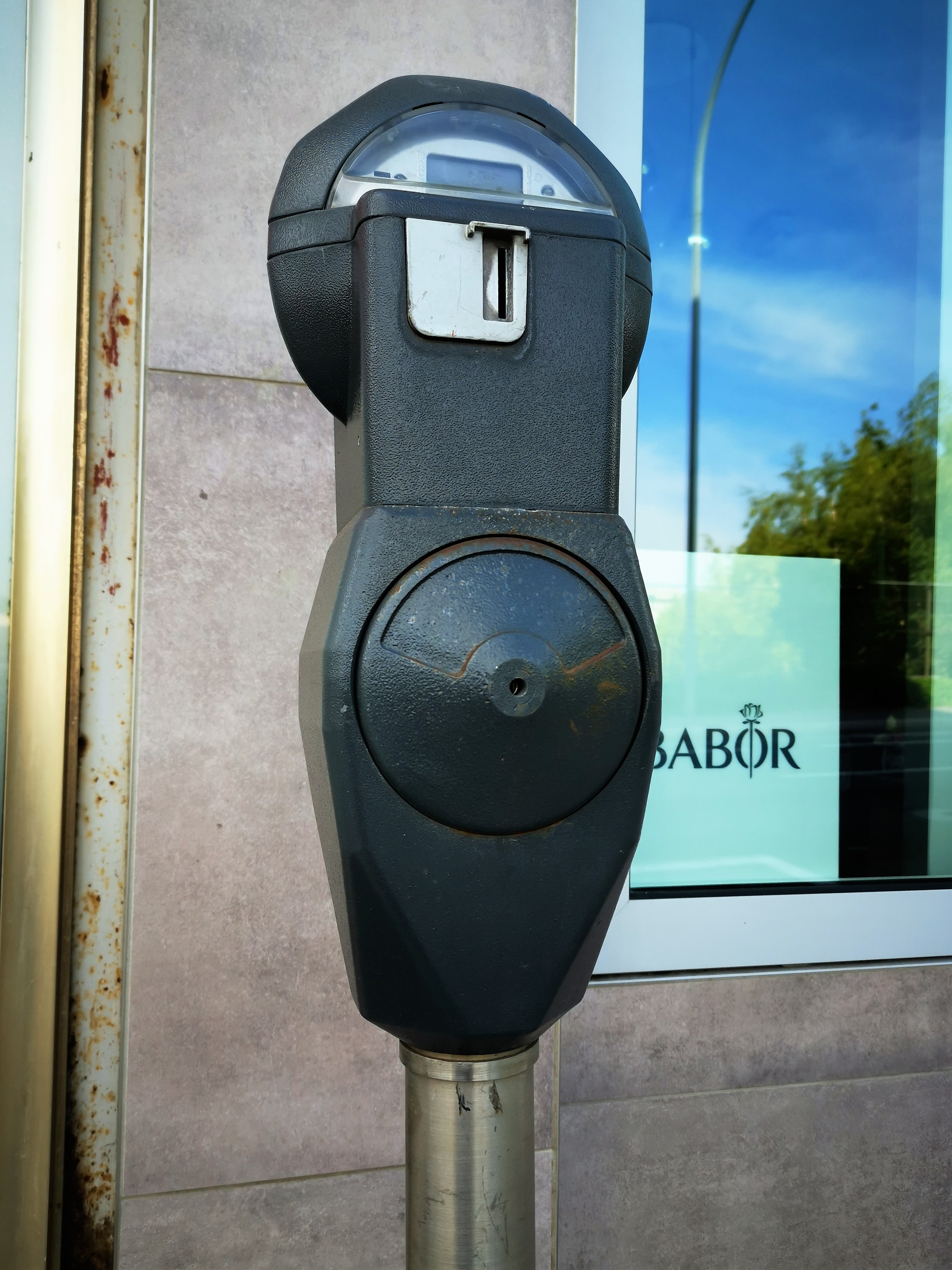 Luxembourg. Parcmètre du fabricant canadien "MacKay", modèle MKH 4000, bd Grande-Duchesse Charlotte.